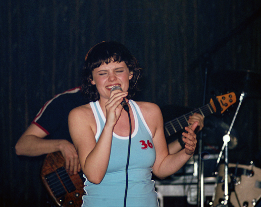 Anna Dąbrowska